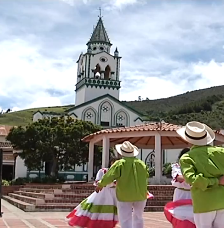 Cácota de Velazco